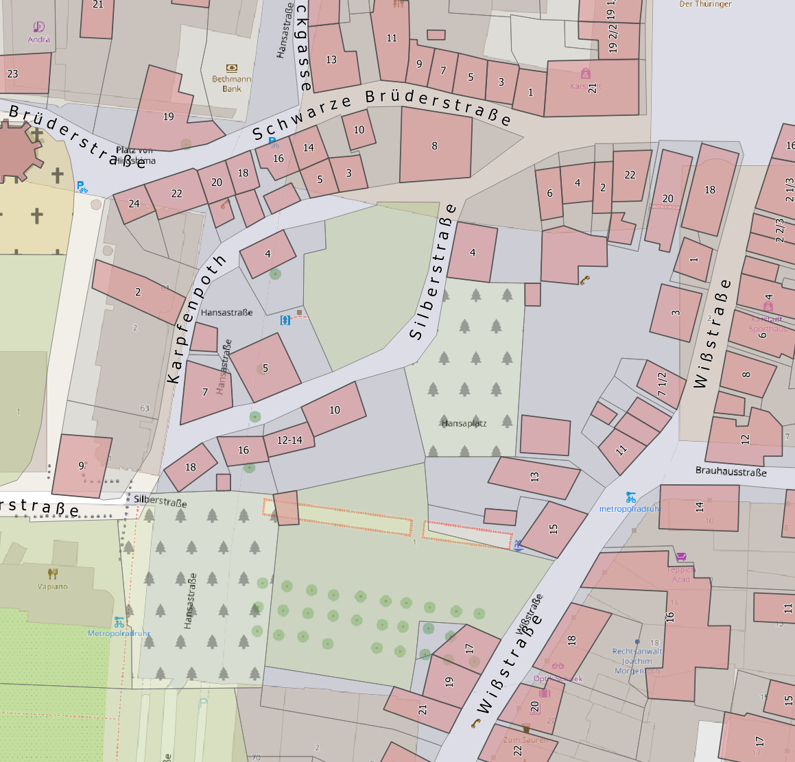 Überlagerung der Katasterkarte von 1826 über eine OpenStreetMap-Karte von 2018. Der Hansaplatz als solcher wie auch die Hansastraße existierten damals noch nicht. Das Gebiet war locker bebaut um die Straßen Silberstraße, Wißstraße und den heute nicht mehr existierenden Karpfenpoth.